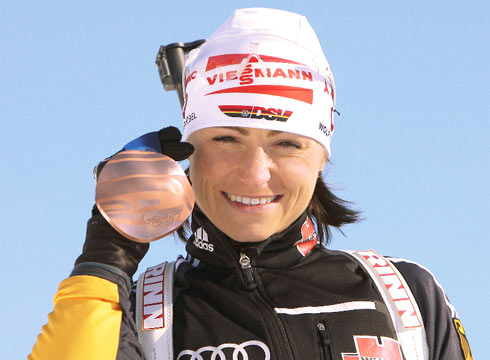 Андреа Хенкель